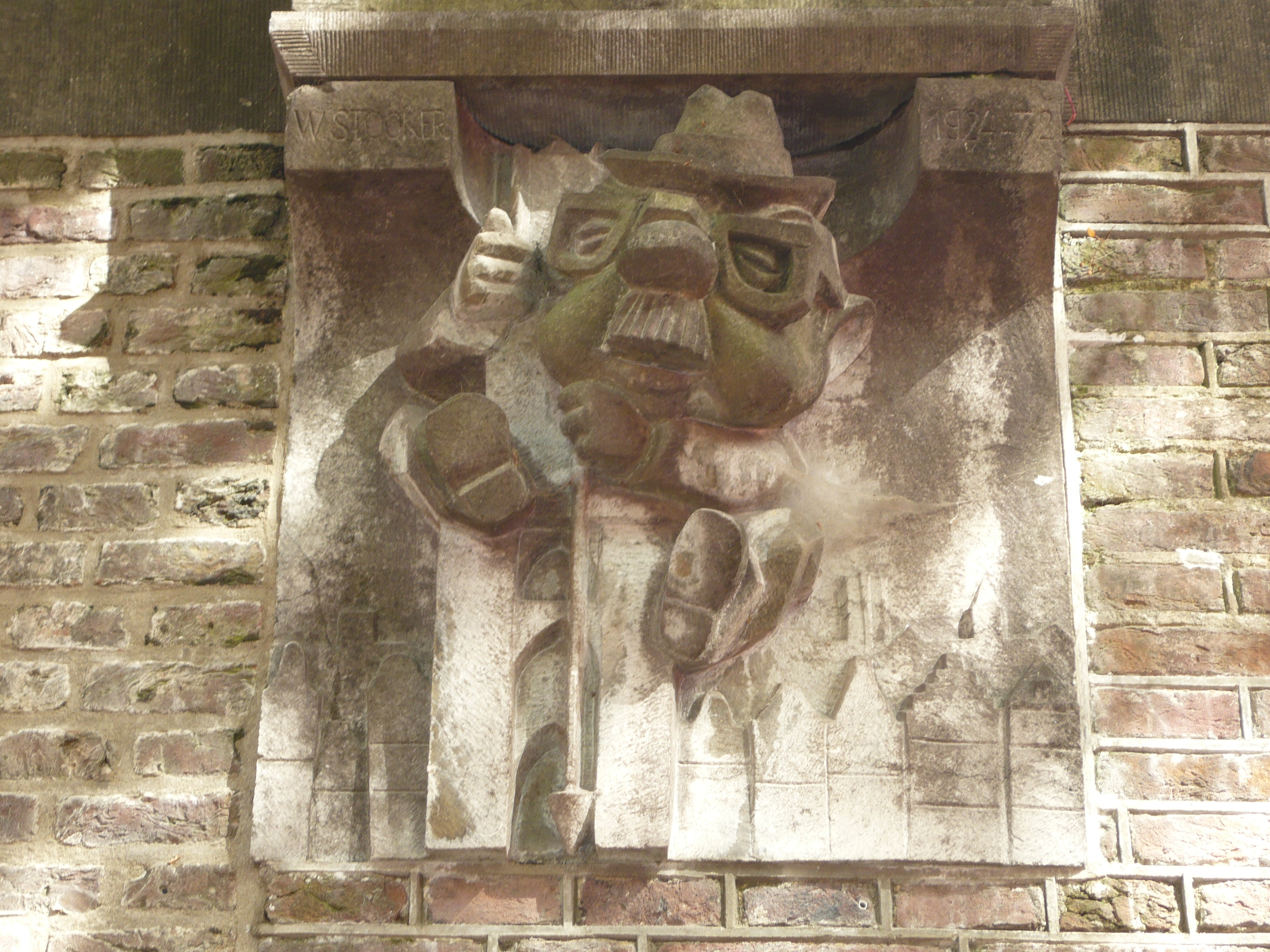 Willem Stooker, een Nederlands architect, gemeentelijk opzichter enz. die een project aanzwengelde om vele lantaarnconsoles in de Utrechtse binnenstad van beeldhouwwerken te voorzien. Hier is hij zelf uitgebeeld a/d Oudegracht 130 door Jeanot Bürgi met de Domtoren.